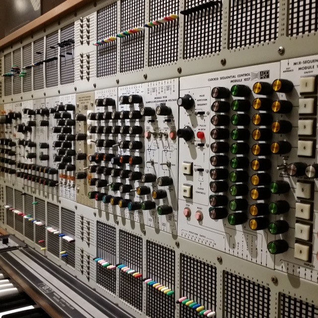 “う～ん、楽しそう。 ARP2500 イケベ 渋谷”